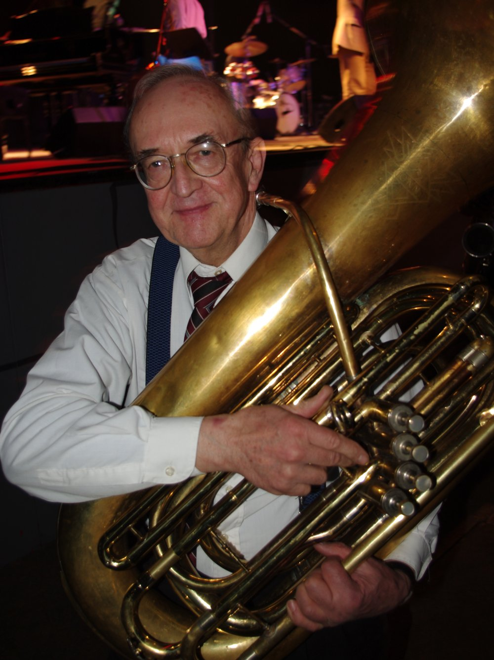 Tubista jazzowy